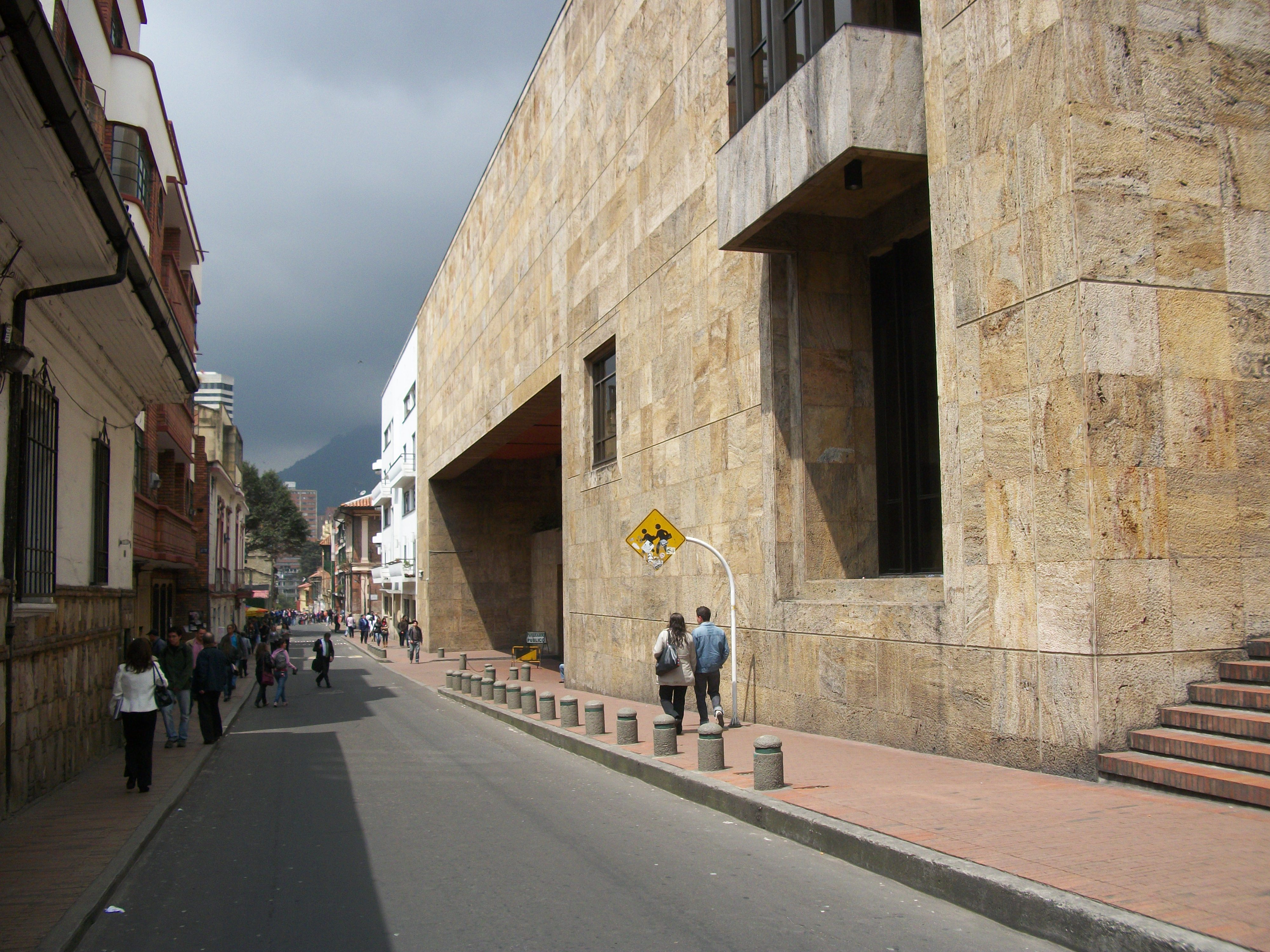 Costado oriental de la bilbioteca Luis Ángel Arango en La Candelaria, Bogotá.